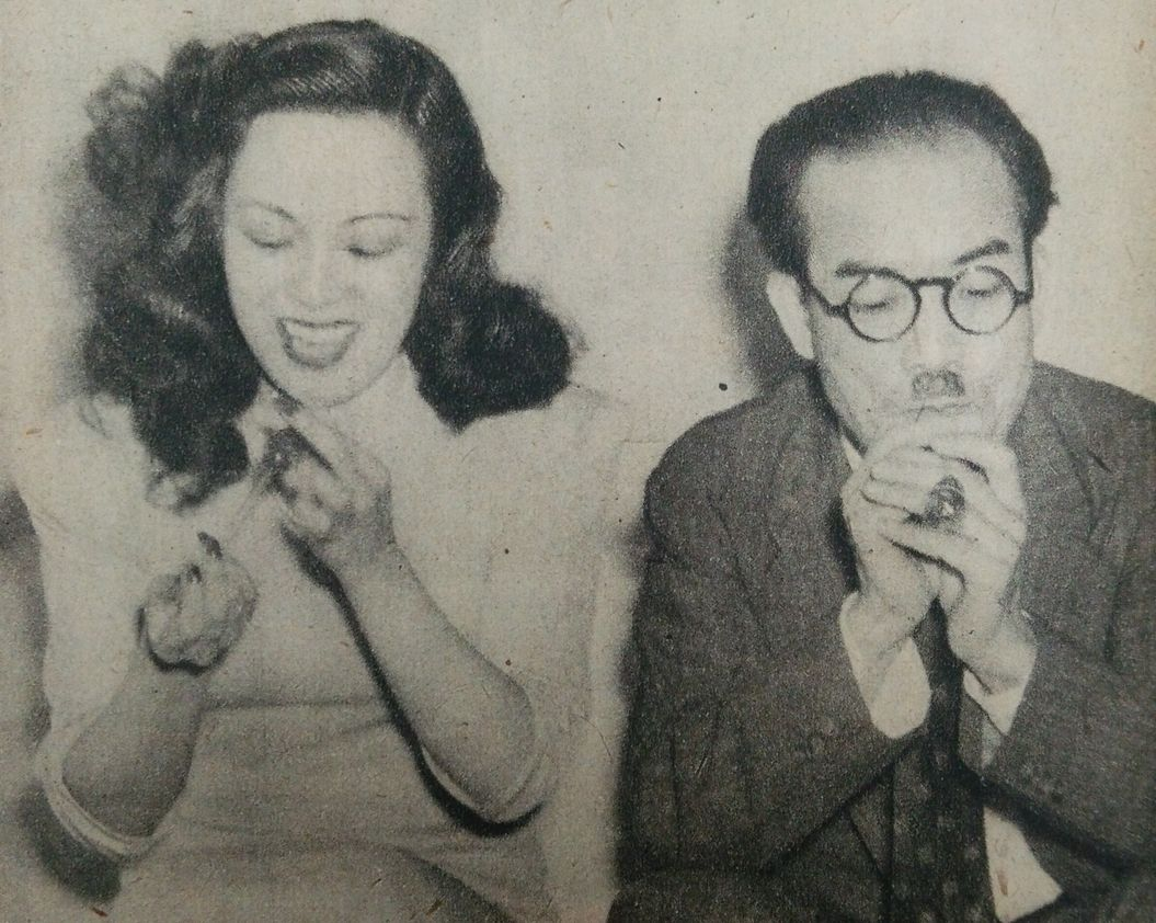 シャボン玉を作る山口淑子と横山エンタツ